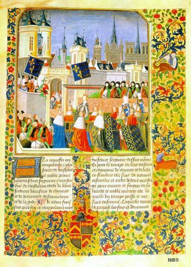 Isabeau de Bavière zog am 22. August 1389 in Paris ein, um am folgenden Tag zur Königin von Frankreich gekrönt zu werden. Die Feierlichkeiten dauerten eine Woche. Sie wurden noch Jahrzehnte später als das größte Fest gepriesen, das je in Frankreich gefeiert worden war. Feierlicher Einzug der Isabeau de Bavière in Paris Pergament (Reproduktion) Original: London, British Library, Department of Manuscripts